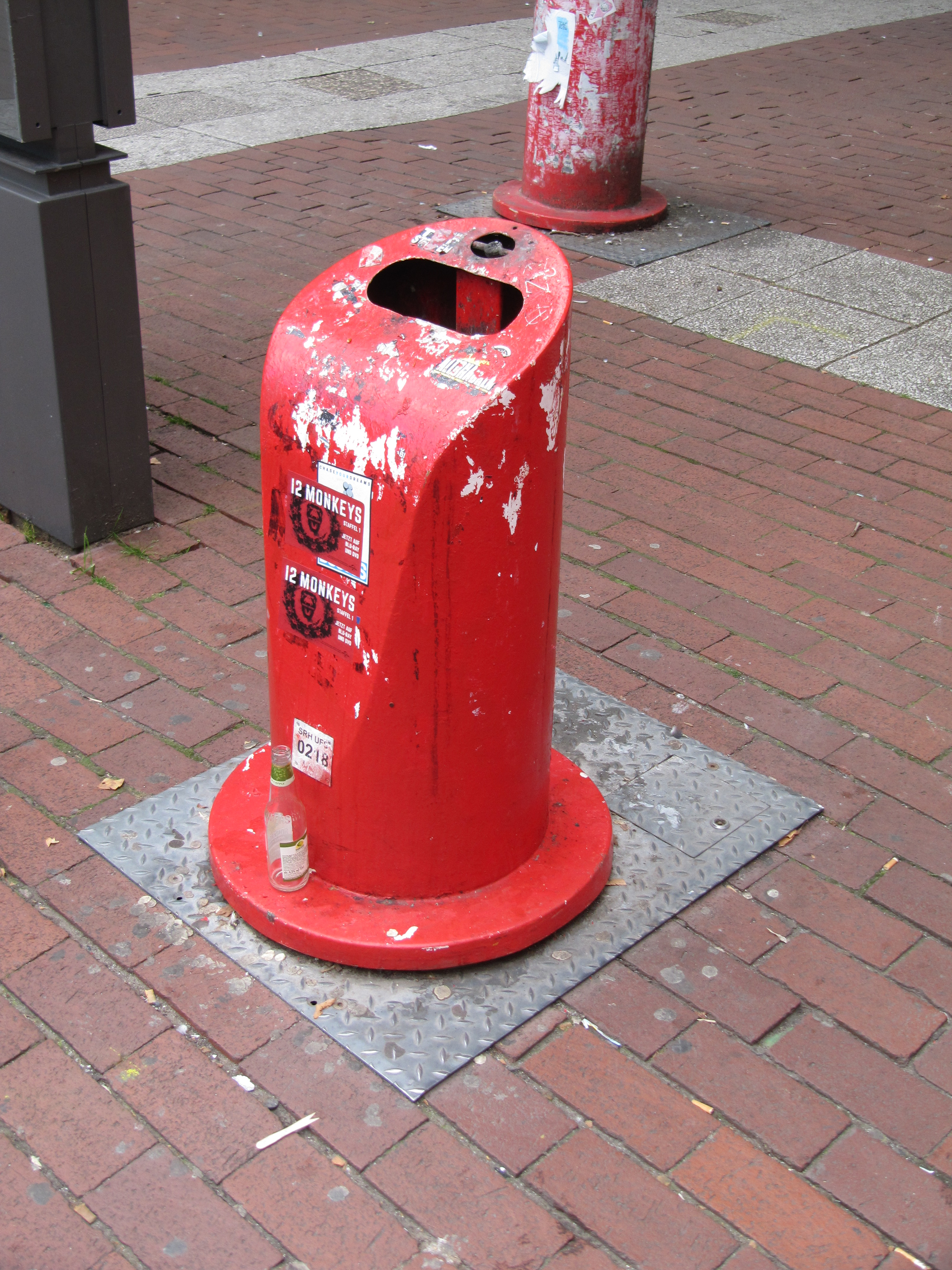 Hamburg (Bezirk Altona) Unterflurabfalleimer (Aug. 2016)